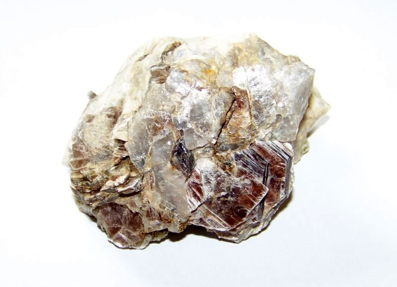 Muskowit w pegmatycie anatektycznym z Gór Sowich. Michałkowa, Dolny Śląsk, Polska.